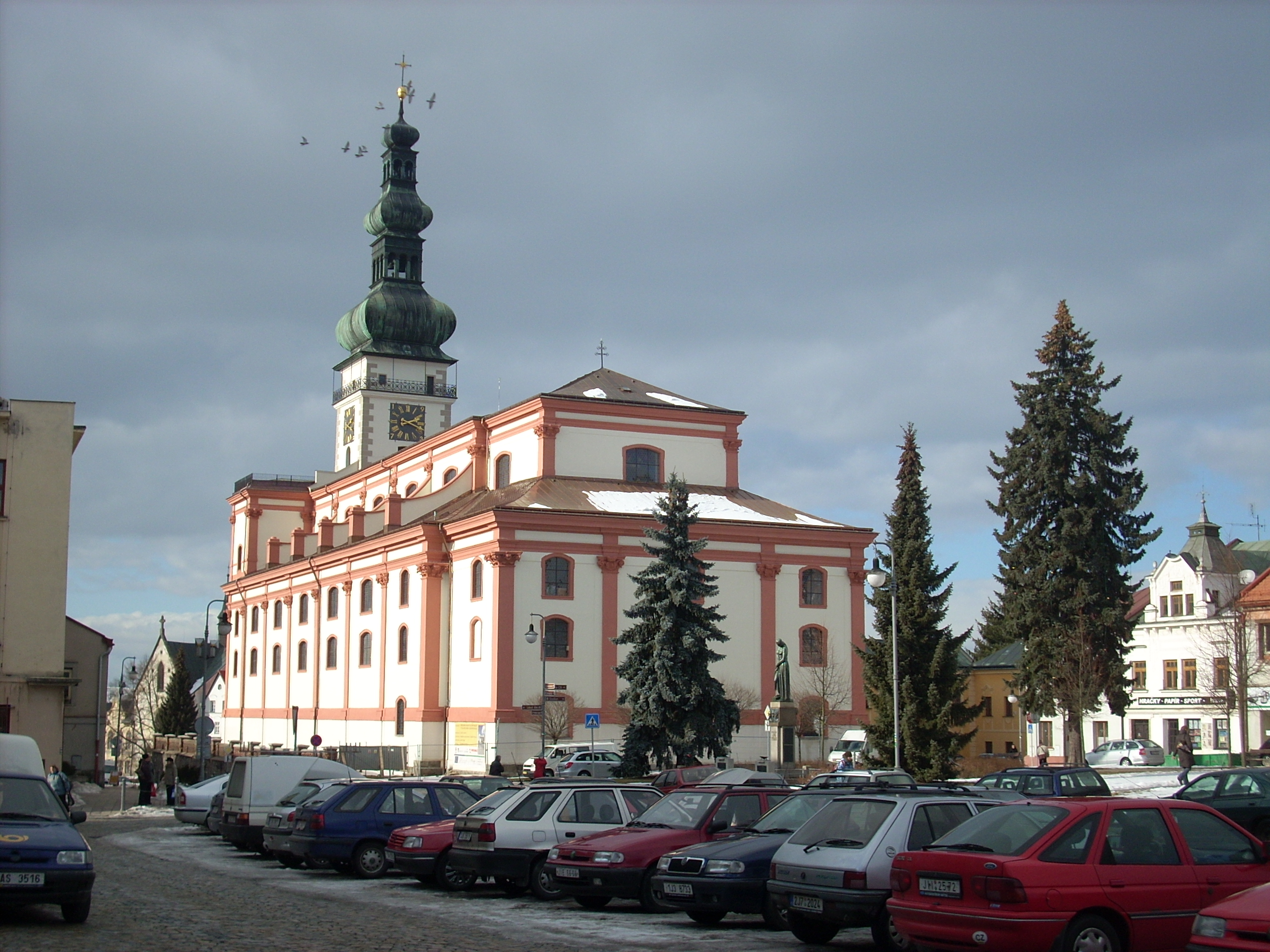 Kostel Nanebevzetí Panny Marie, Polná, stav 2012